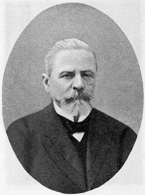 Нарышкин Александр Алексеевич